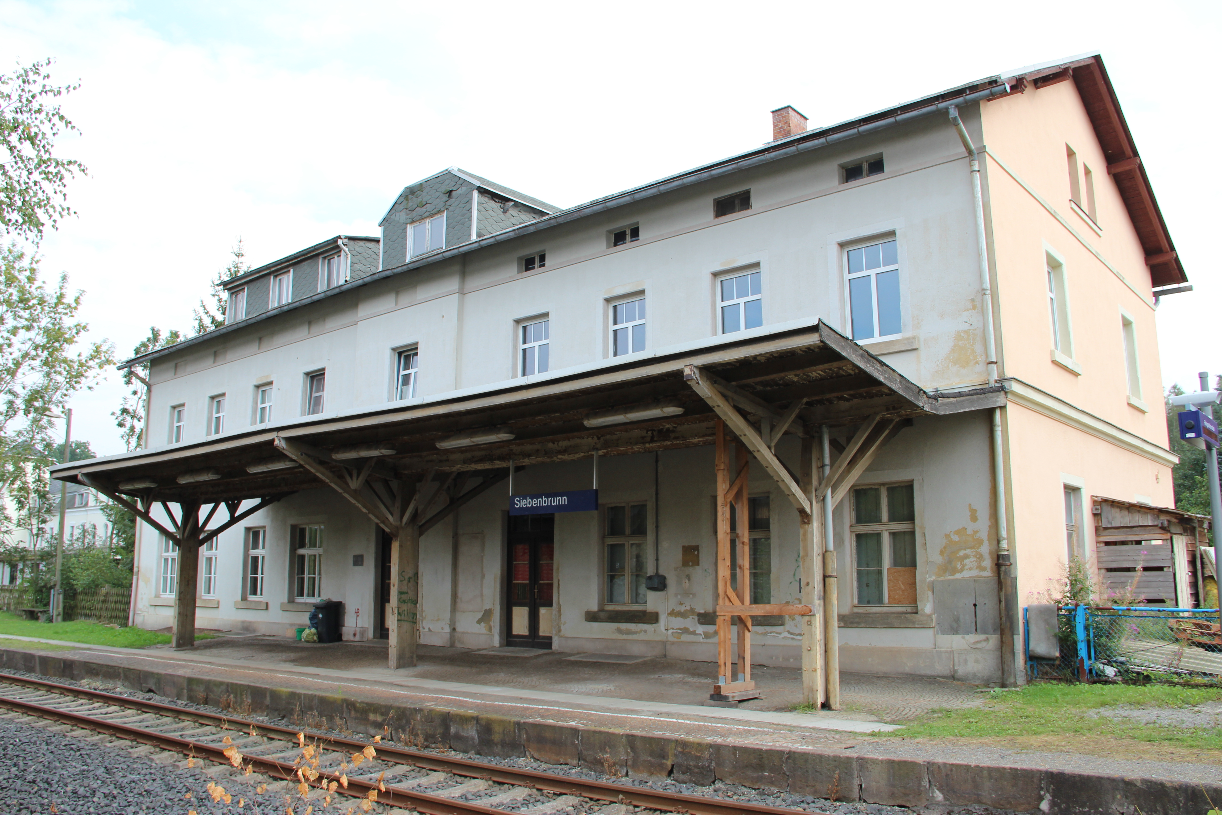 Ehemaliger Bahnhof Siebenbrunn/Vogtland